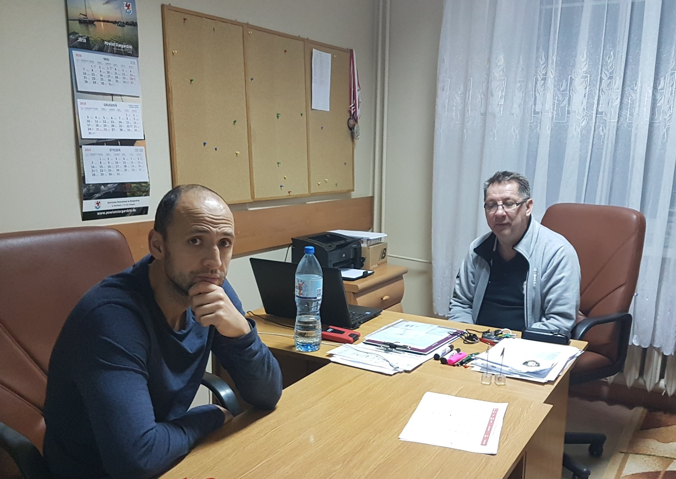 Sztab trenerski Spójni Stargard (18.12.2018)